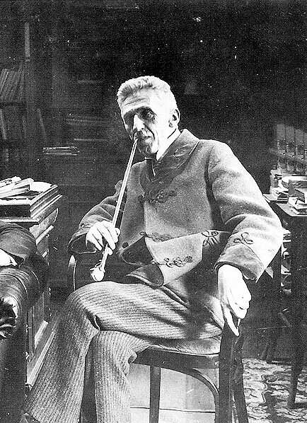 Gárdonyi Géza dolgozószobájában